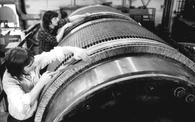 Dresden, polnische Gastarbeiter ADN-ZB Häßler 10.2.75 Bez. Dresden: Für einen Walzstraßenantrieb dient diese Elektromaschine, an der die Wickler Matusiak (vorn) und Jerzy Mzyk (beide aus der VR Polen) Schleifarbeiten ausführen. Die Elektromaschinenbauer des VEB Sachsenwerk Dresden wollen gegenüber den verschiedensten Indutriezweigen ihre Vertragsverpflichtungen in jedem Monat kontinuierlich erfüllen. Das Wettbewerbsprogramm der 60 sozialistischen Brigarden der Maschinenfabrik sieht gegenüber 1974 eine Steigerung der Warenproduktion um 3.7 % vor. Dieses anspruchsvolle Ziel wollen die Werkstätigendurch eine konzentrierte und konsequente Durchsetzung der wissenschaftlichen Arbeitsorganisation erfüllen.